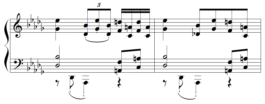 Debussy - Etude pour les sixtes, mes/51-52